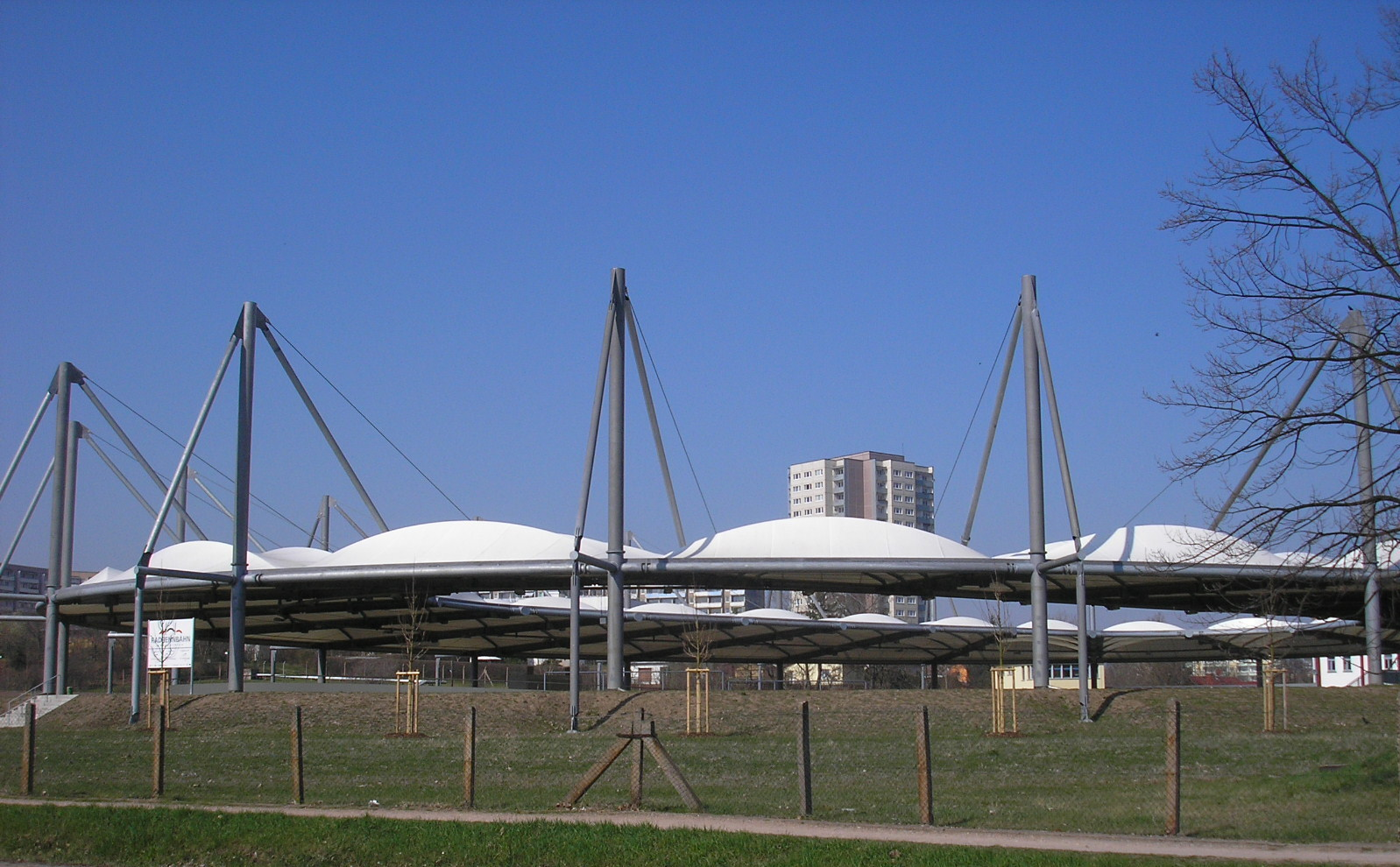 Die Radrennbahn Andreasried in Erfurt.